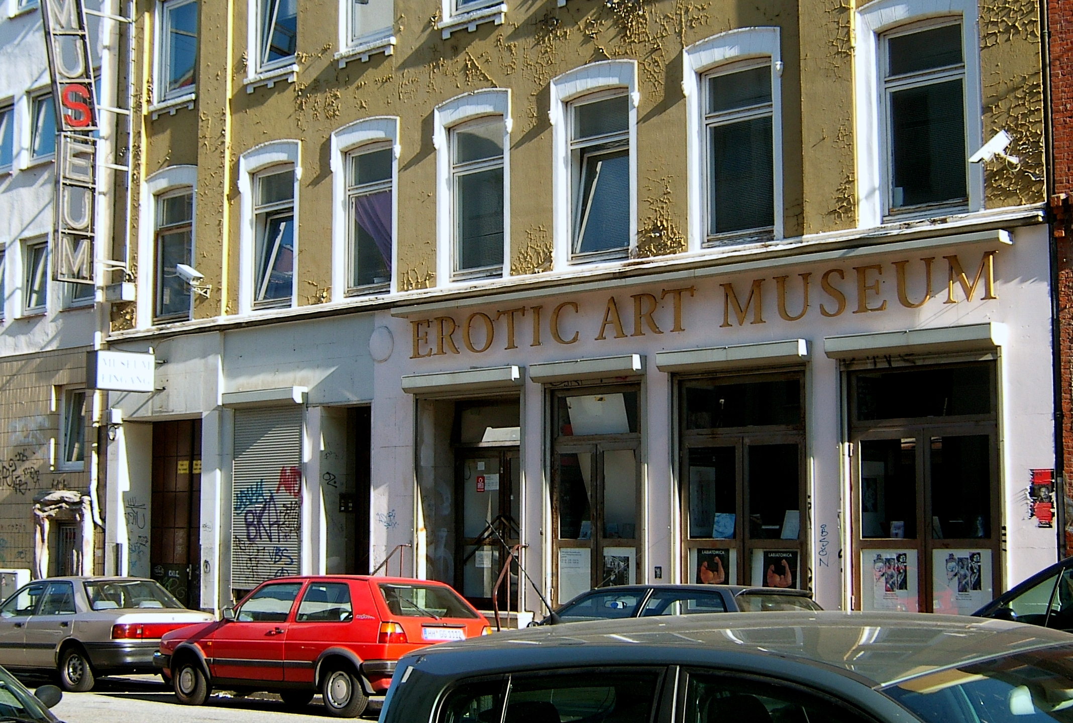 Bildbeschreibung: Hamburg, St. Pauli, Erotic Art Museum, Bernhard-Nocht-Straße Fotograf: selbst Datum: 28.6.2006